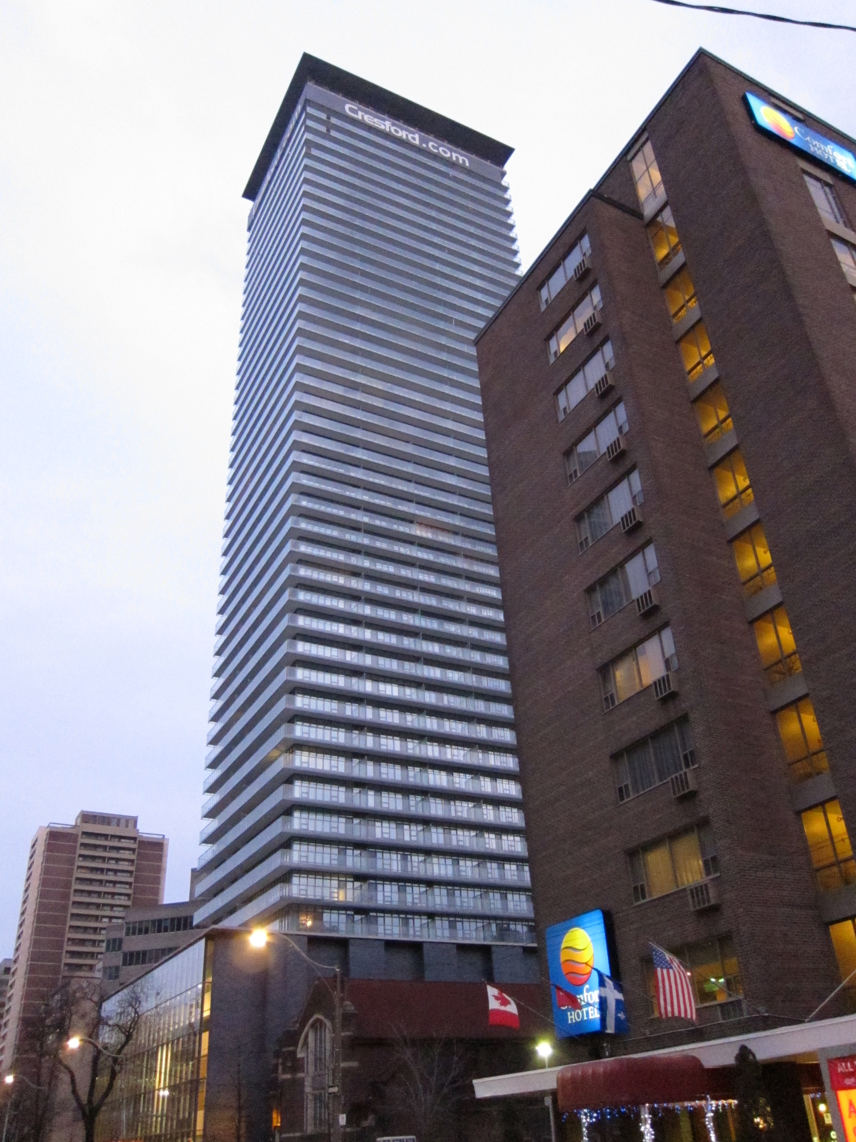 Casa condominium, Charles Street, Toronto, Canada